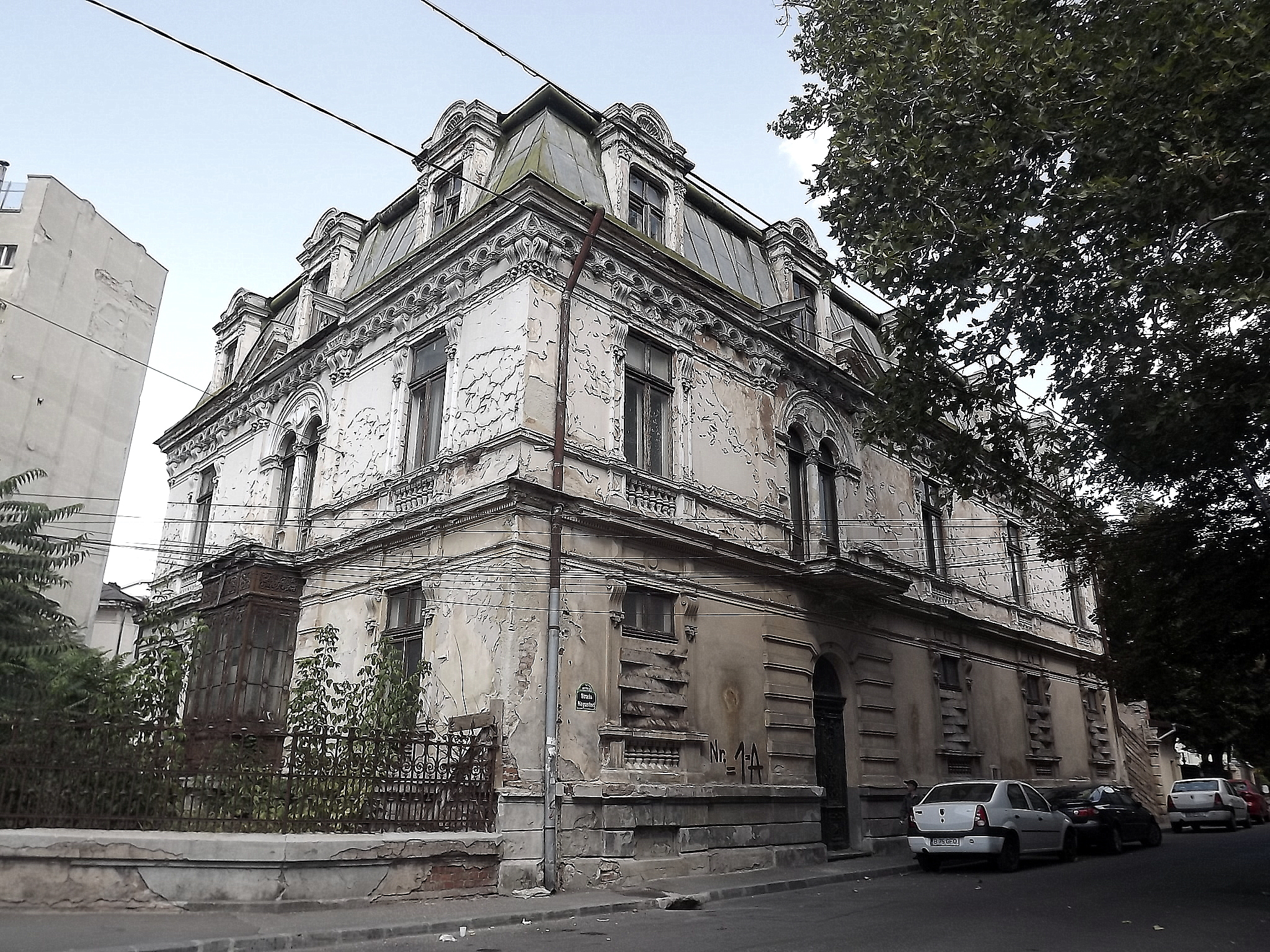 Casa Negroponte